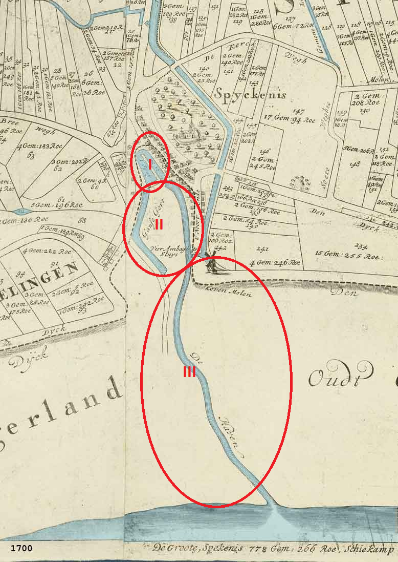 Kaart haven Spijkenisse 1700 met aanduidingen: I. De Rademacherstraat en de huizen ten zuidoosten ervan: totdat dit deel in 1964 werd gedempt, liep de haven tot aan het begin van de Nieuwstraat II. De haven vanaf de Kaaistraat tot aan de Schenkelweg (bij de molen en De Stoep) III. De haven vanaf de overkant van de Schenkelweg tot aan de Oude Maas